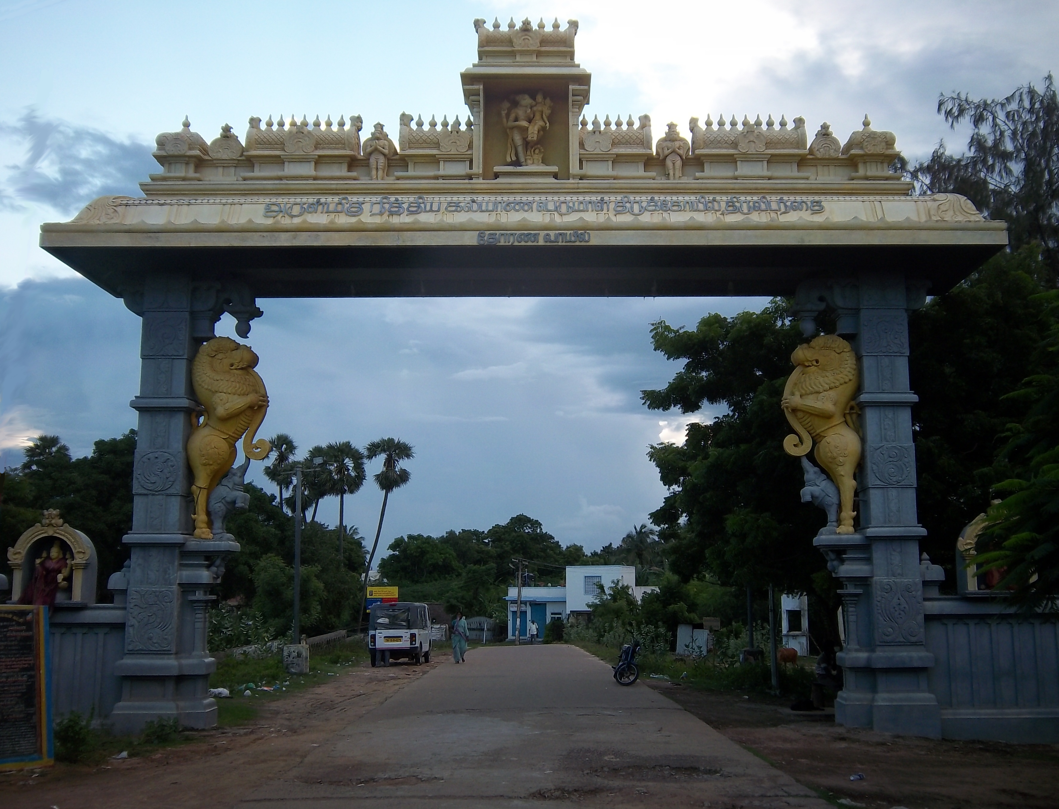 திருவிடந்தை நித்ய கல்யாணப்பெருமாள் கோவில் நுழைவாயில் வளைவு